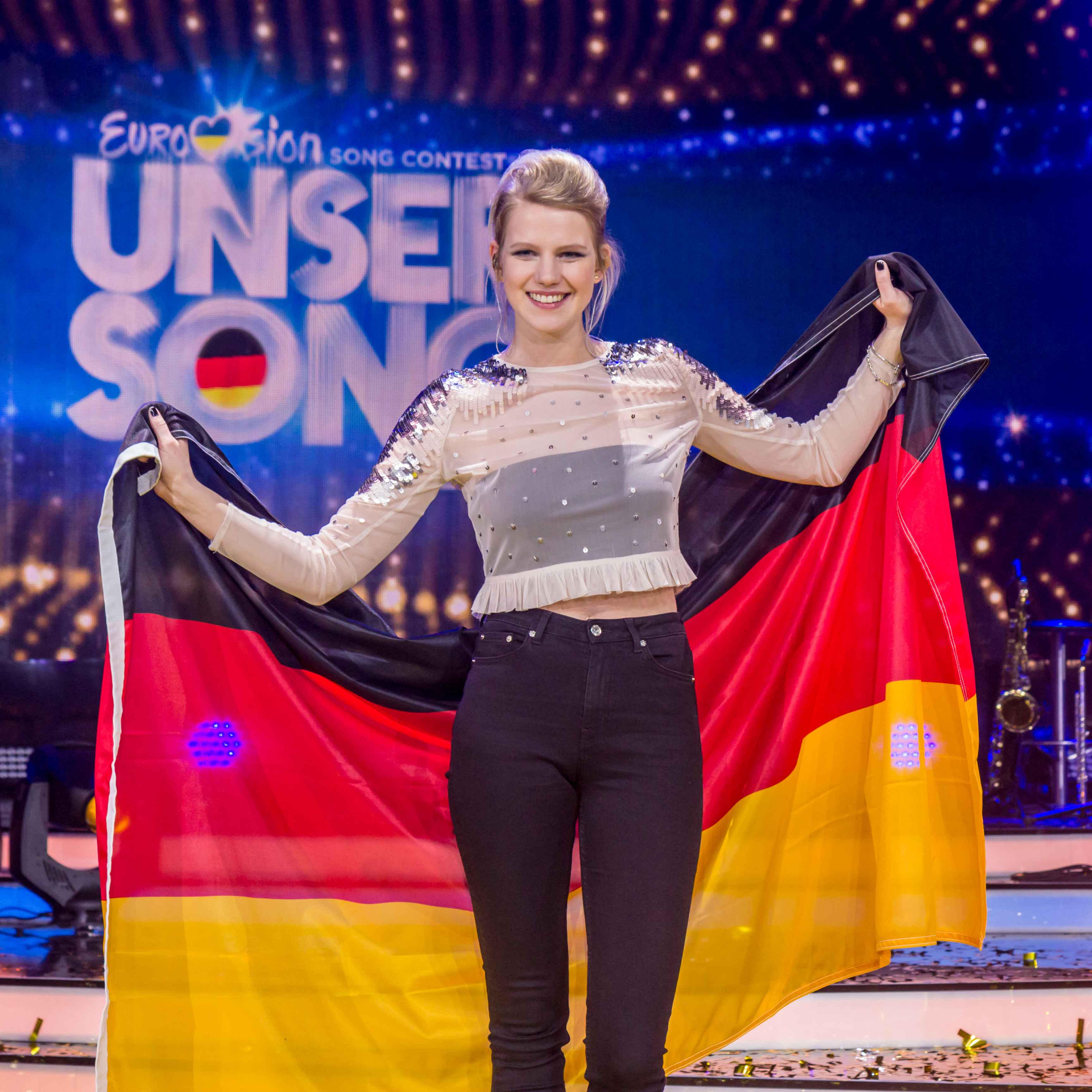 Unser Song 2017 - Liveshow - Levina